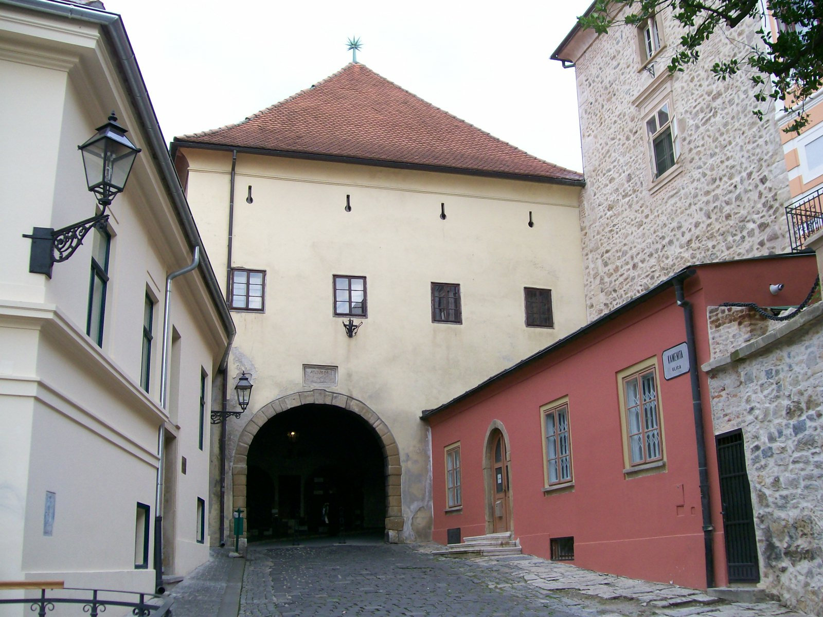 Kamenita vrata - pogled s Trga Braće hrvatskog zmaja (Zagreb)